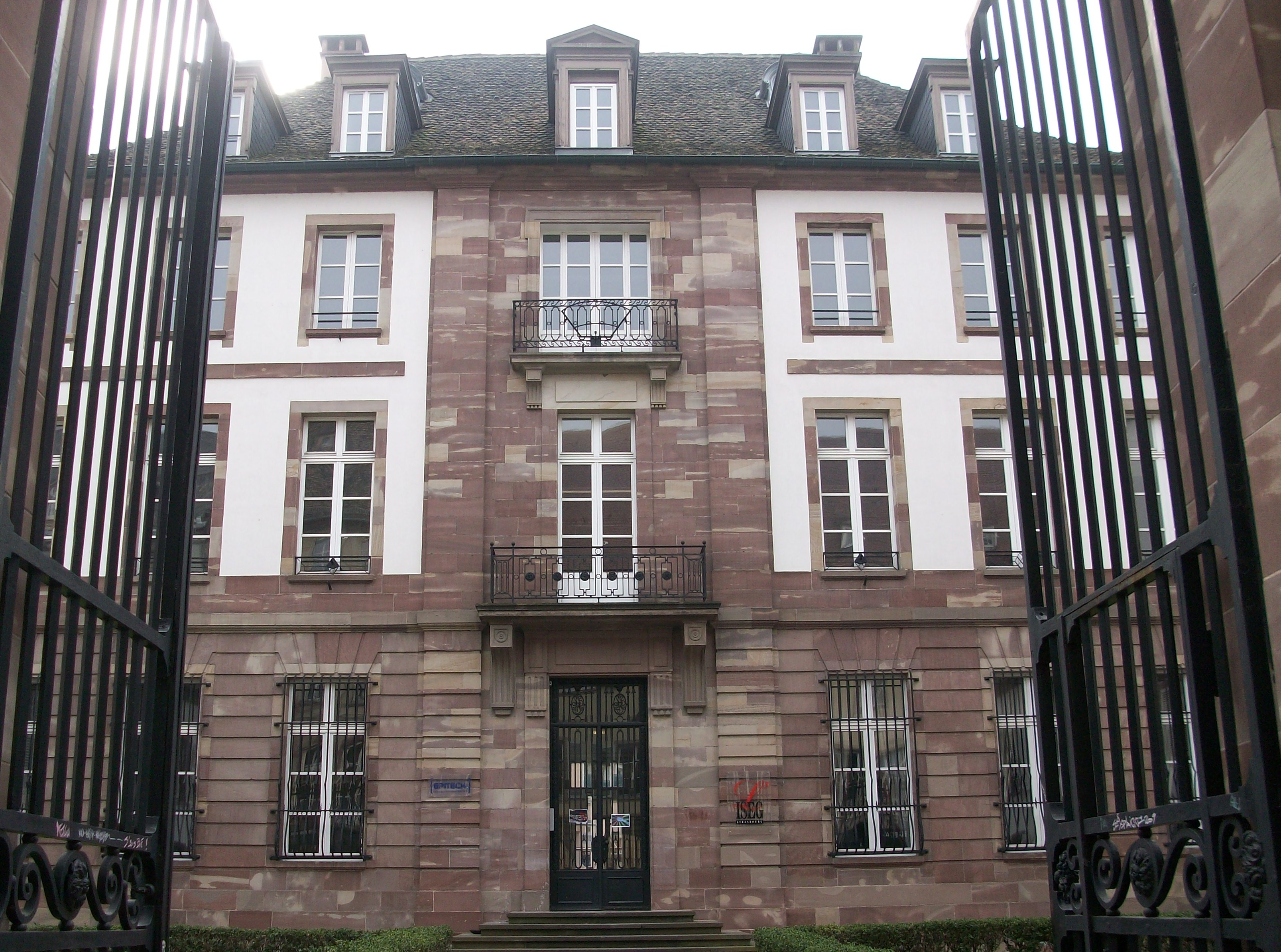 Entrée principale des locaux de l'ISEG et d'Épitech à Strasbourg.